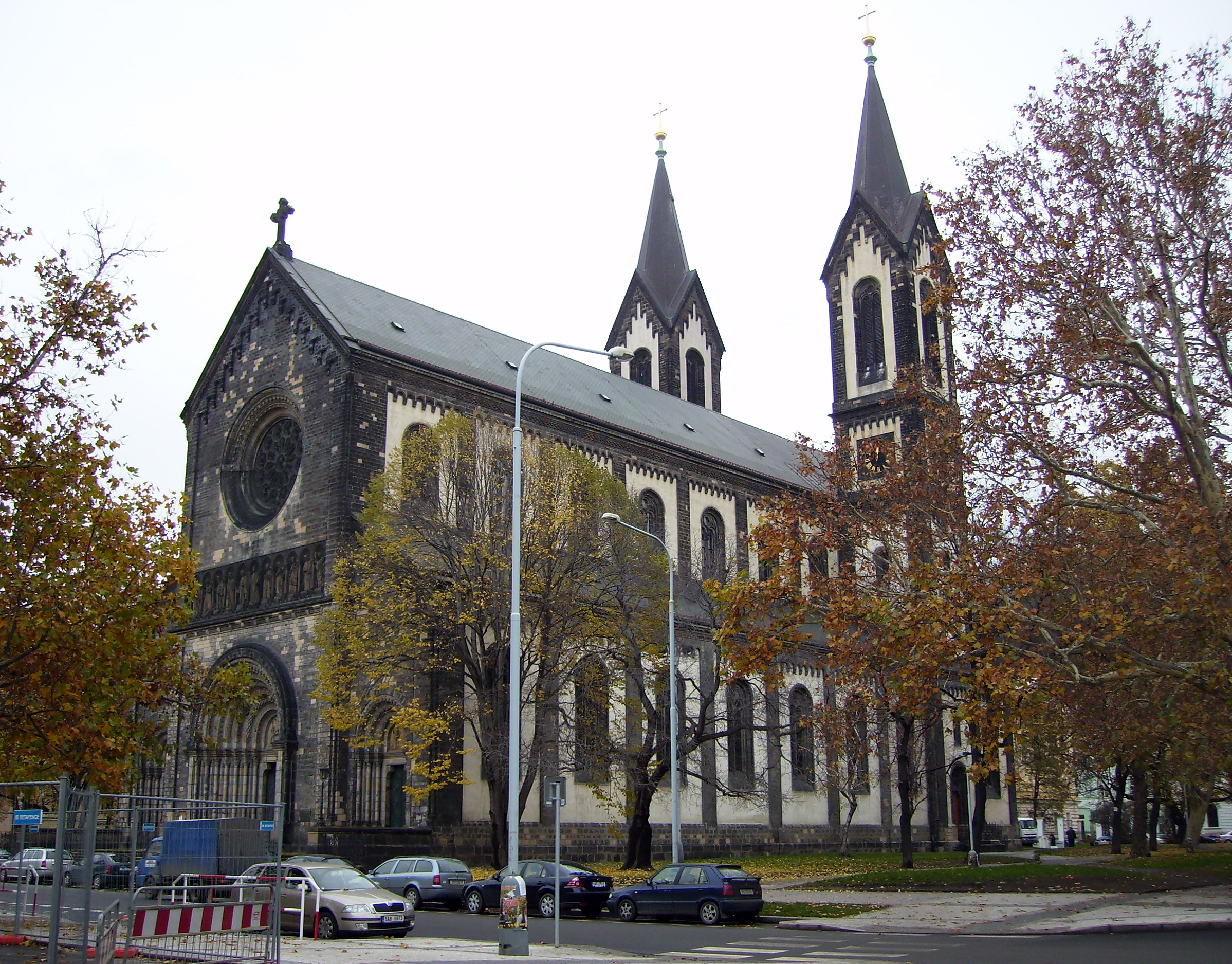 Kostel sv. Cyrila a Metoděje v pražském Karlíně.